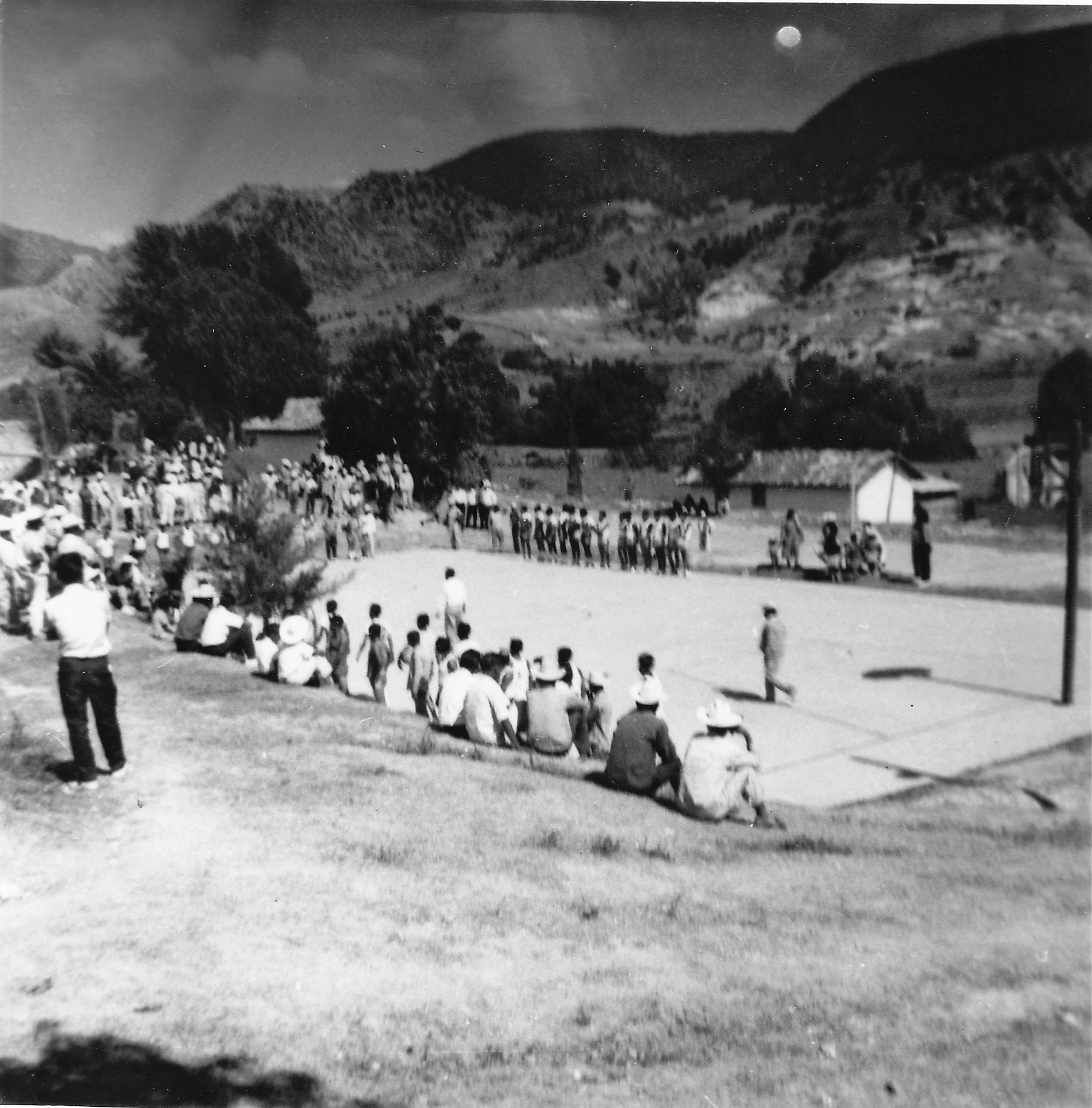 Partido de basquetbol durante la fiesta patronal de San Juan Achiutla, Oaxaca, México. 1954